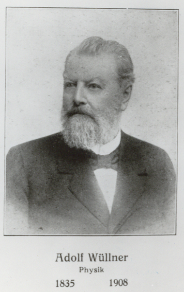 Adolf Wüllner, Portraitfoto